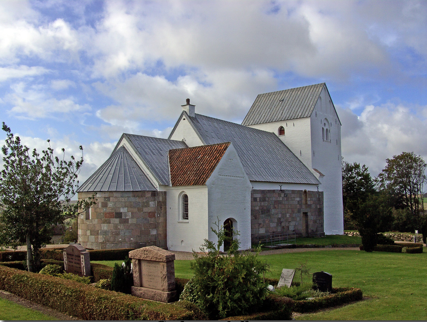 fra sydøst